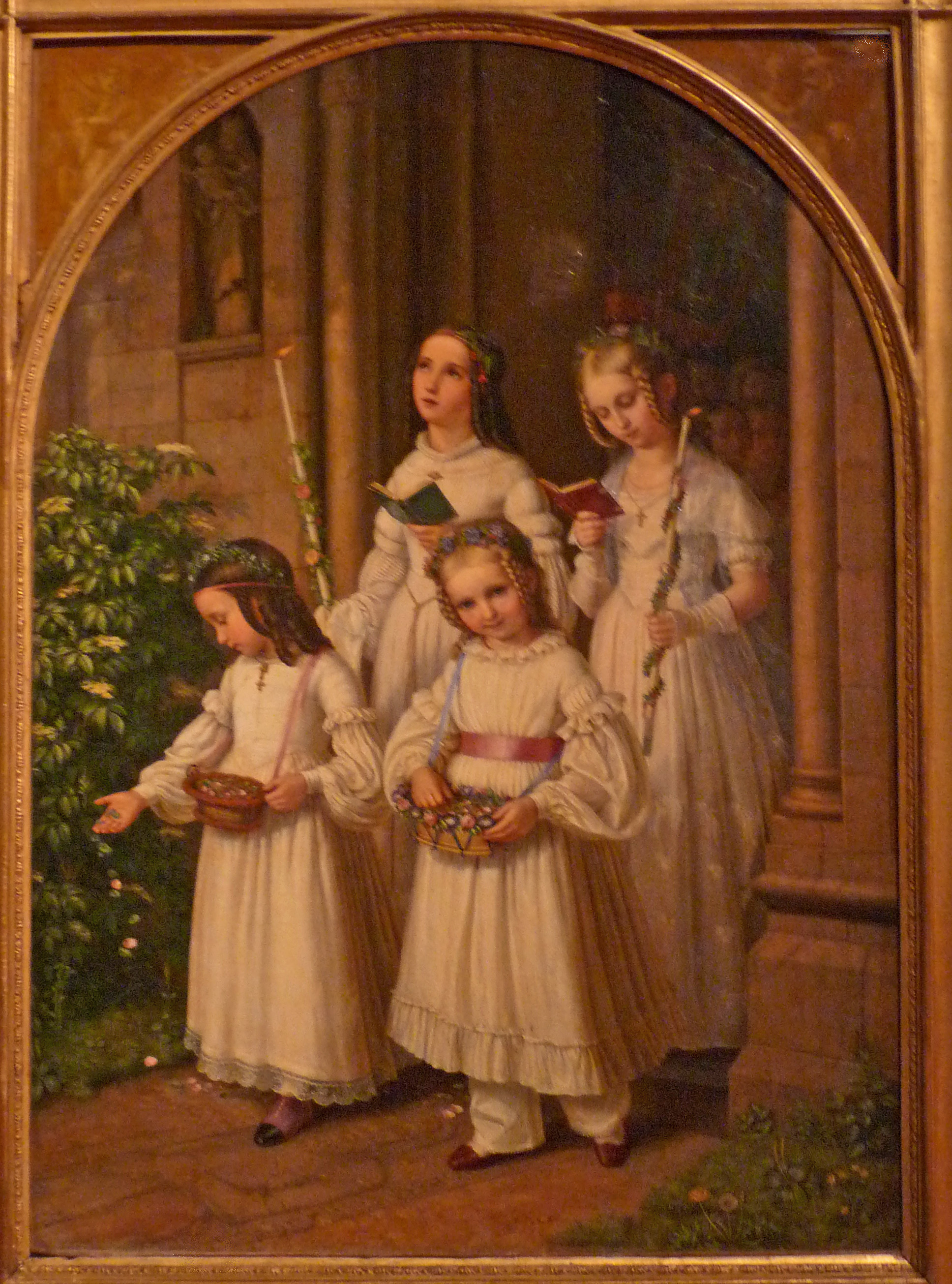 Première communiontitle QS:P1476,fr:"Première communion" label QS:Lfr,"Première communion"